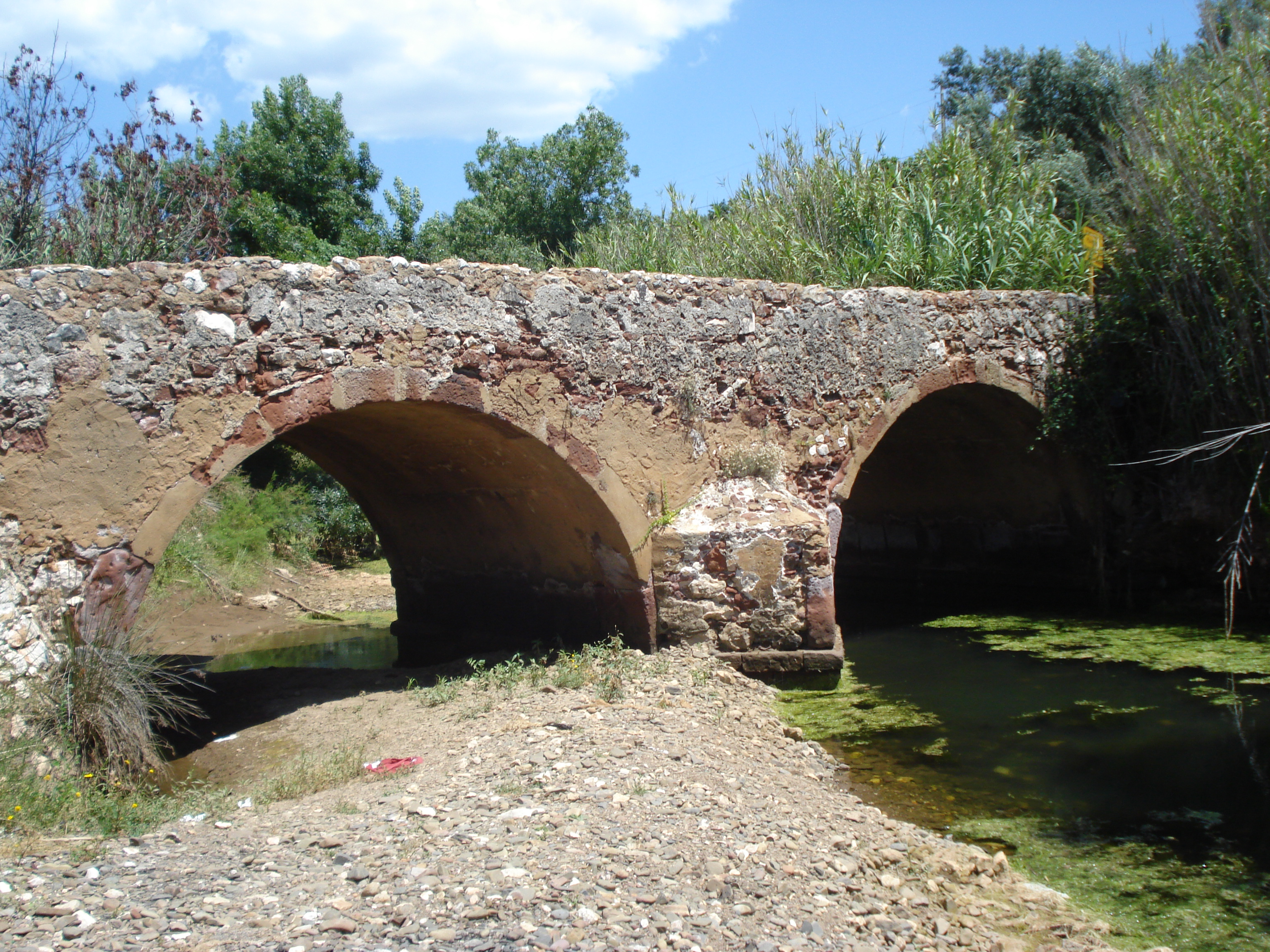 Arão Old Bridge - Odiáxere Brook